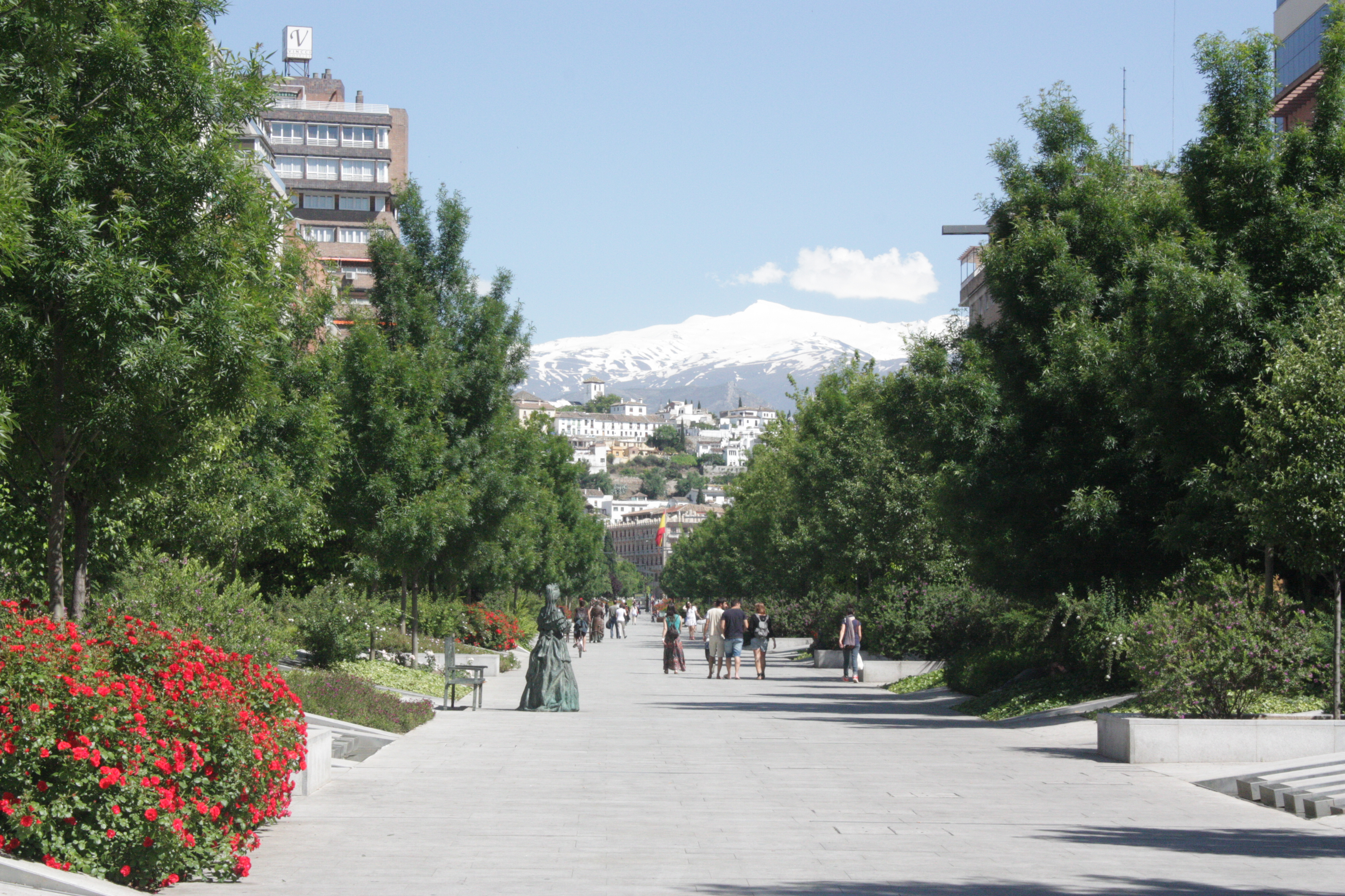 Vistas de Granada y la Sierra Nevada desde la Avenida de la Constitución.